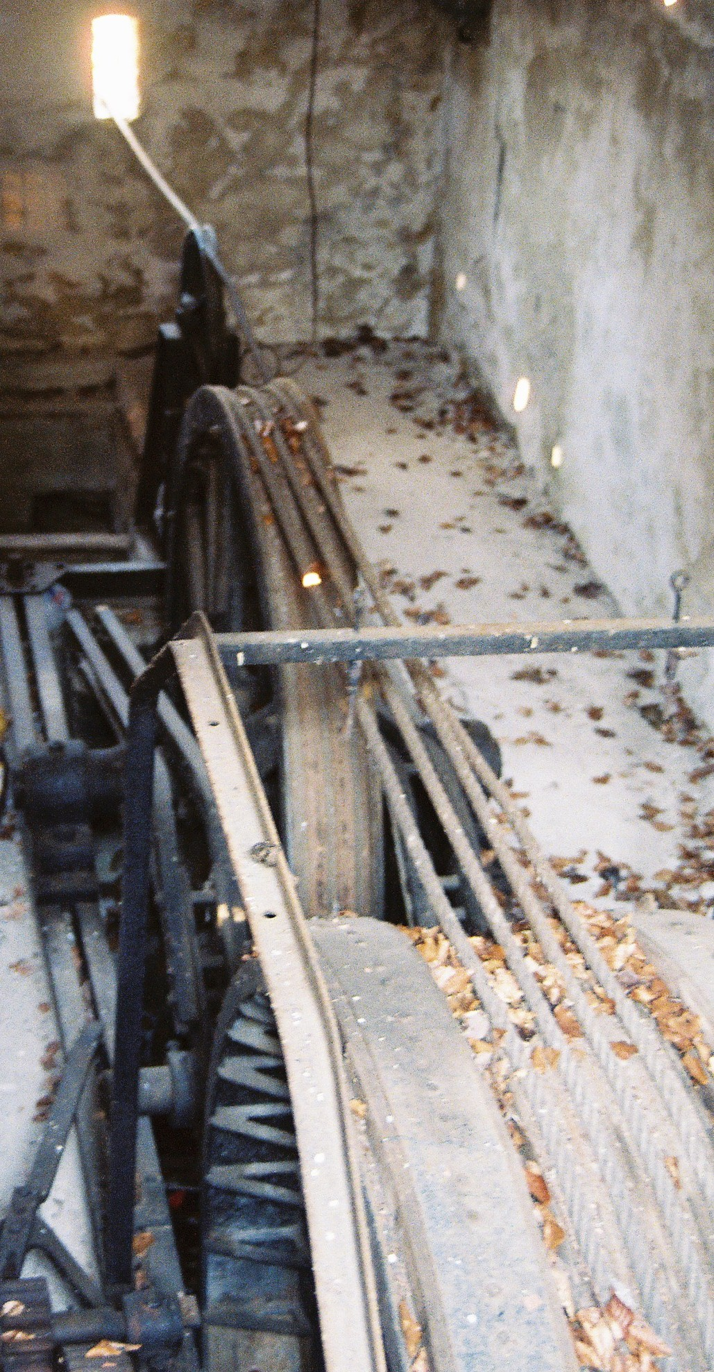 Seiltrommel, Schiefe Ebene Bergstation Szalajkabahn